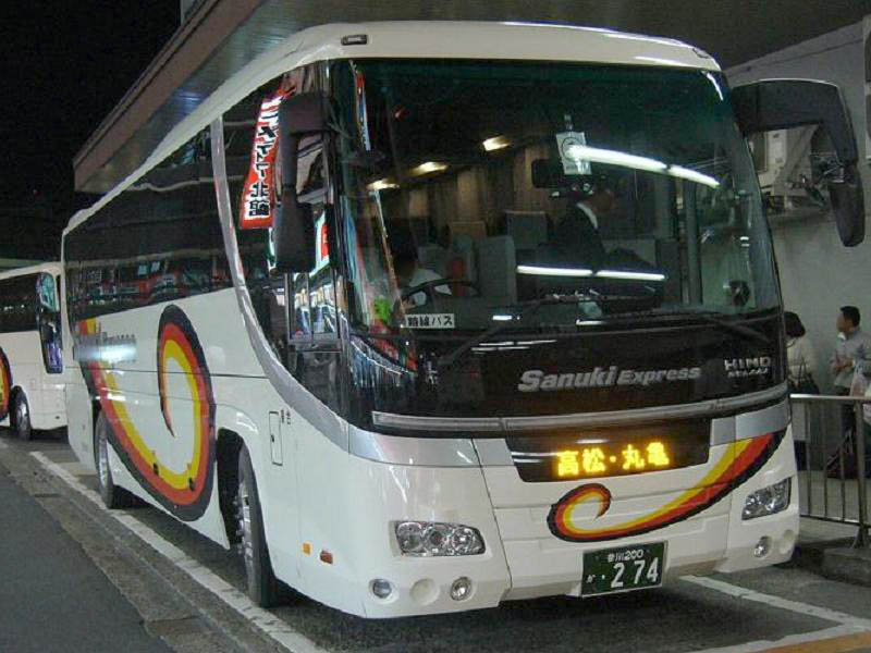 登録番号 香川200か・274 四国高速バス所属 ハローブリッジ号用 2006年5月3日 新宿西口高速バスターミナルにて撮影